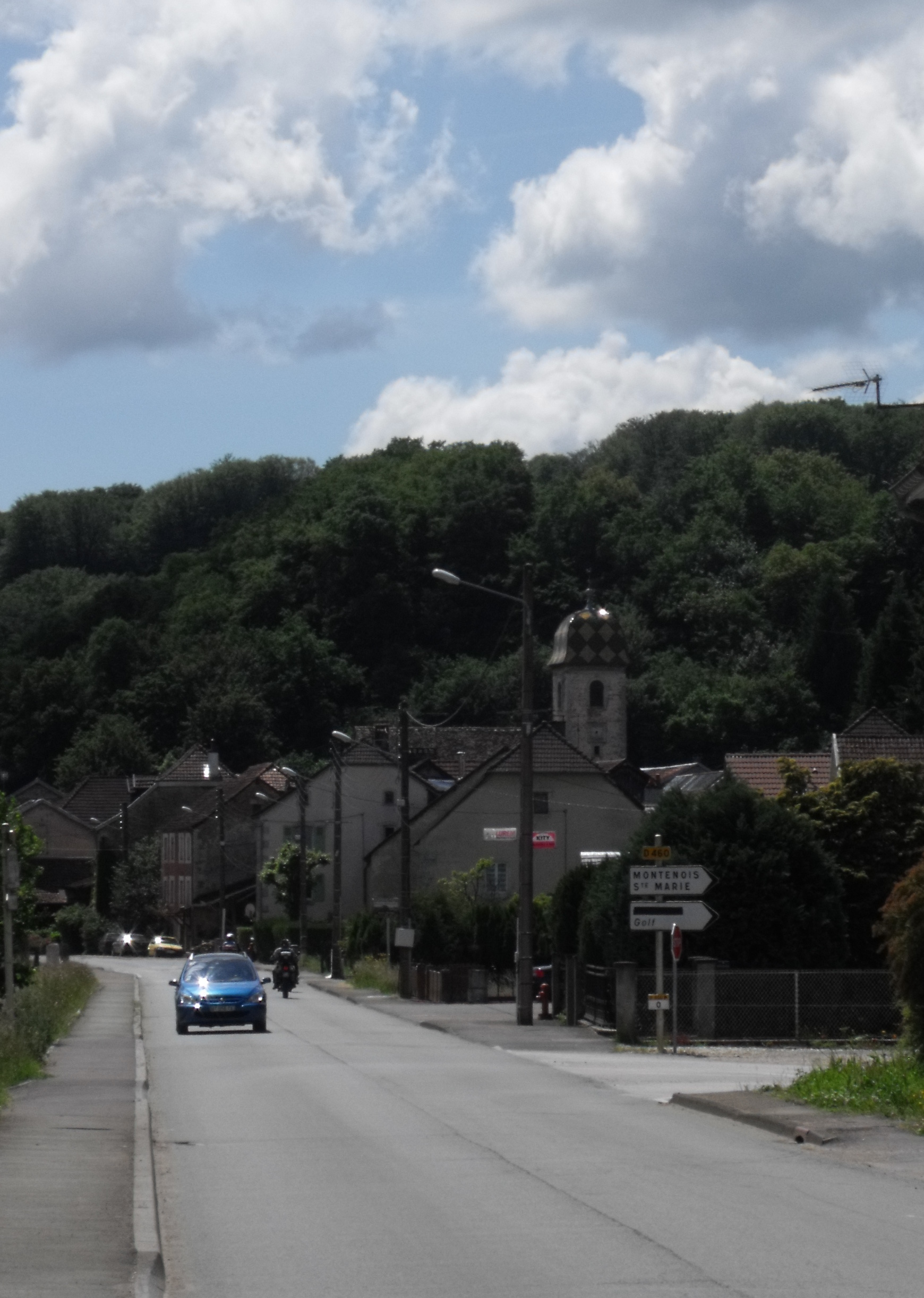 Vue générale et église de Lougres, Département du Doubs, France